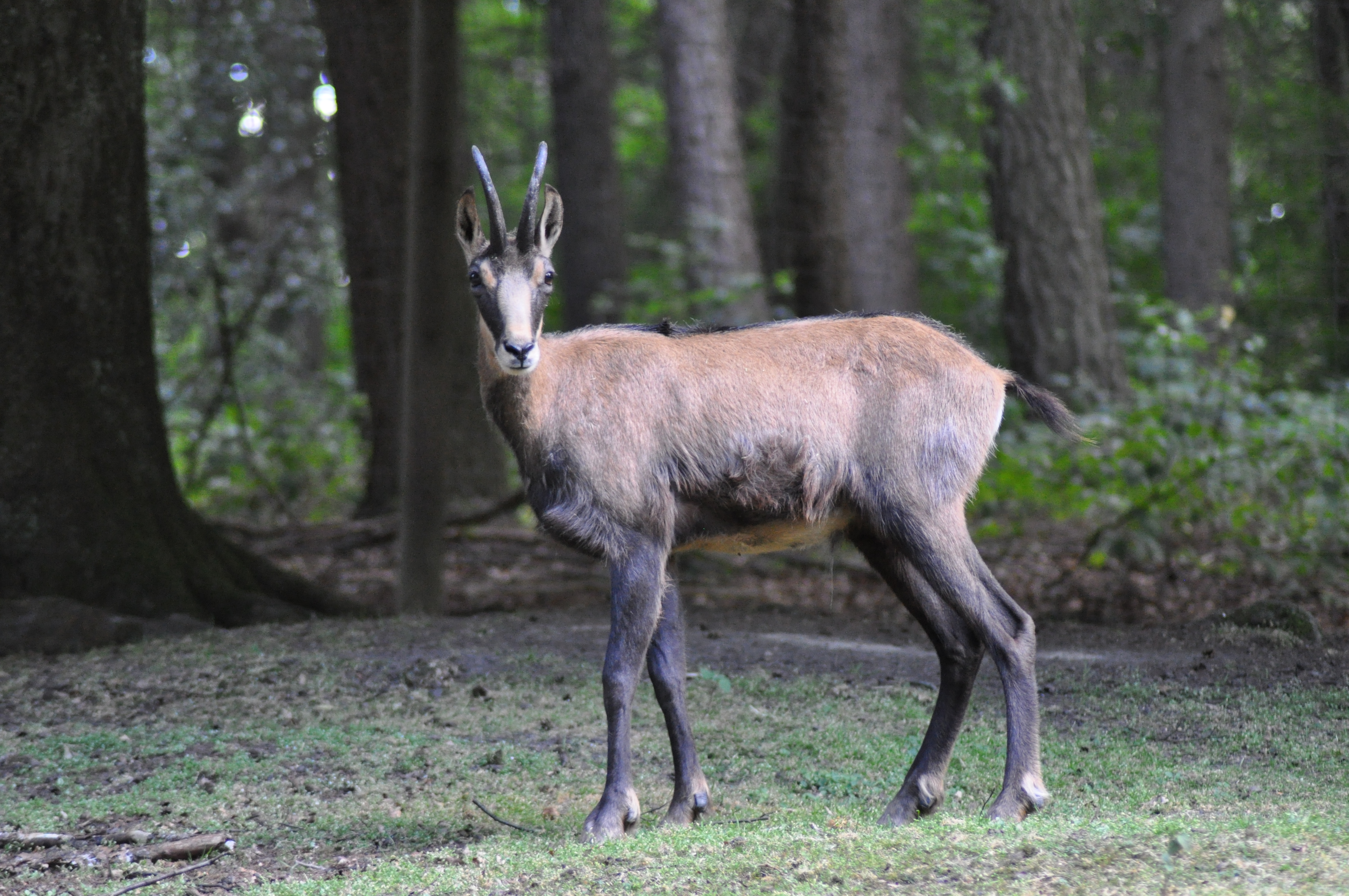 Gämse